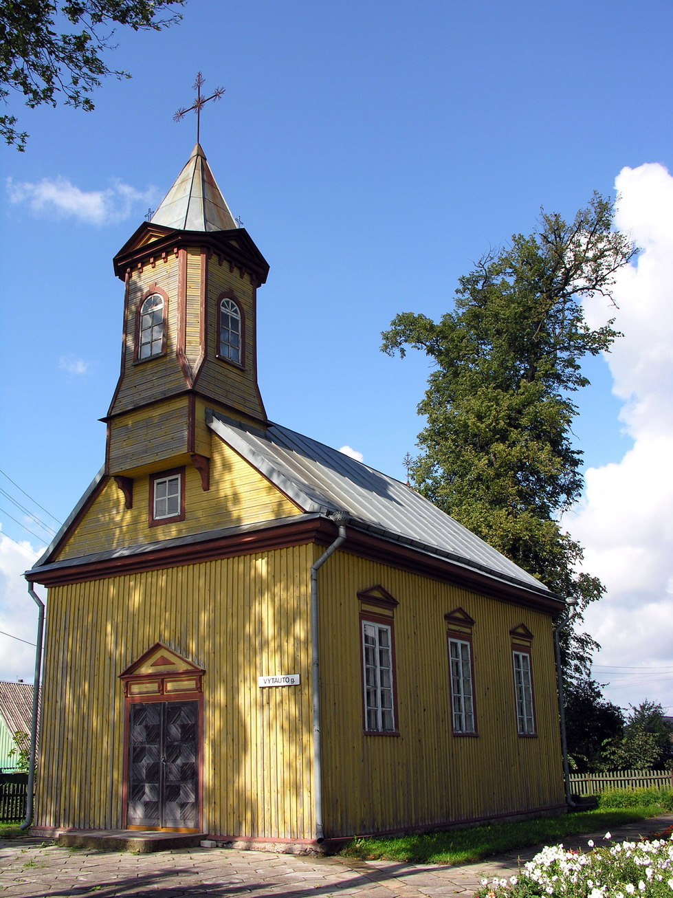 Seda, Mažeikių raj. Sedos Šv. Jono Nepomuko bažnyčia Foto: Algirdas, 2006 m. rugsėjo 2 d., Lietuva